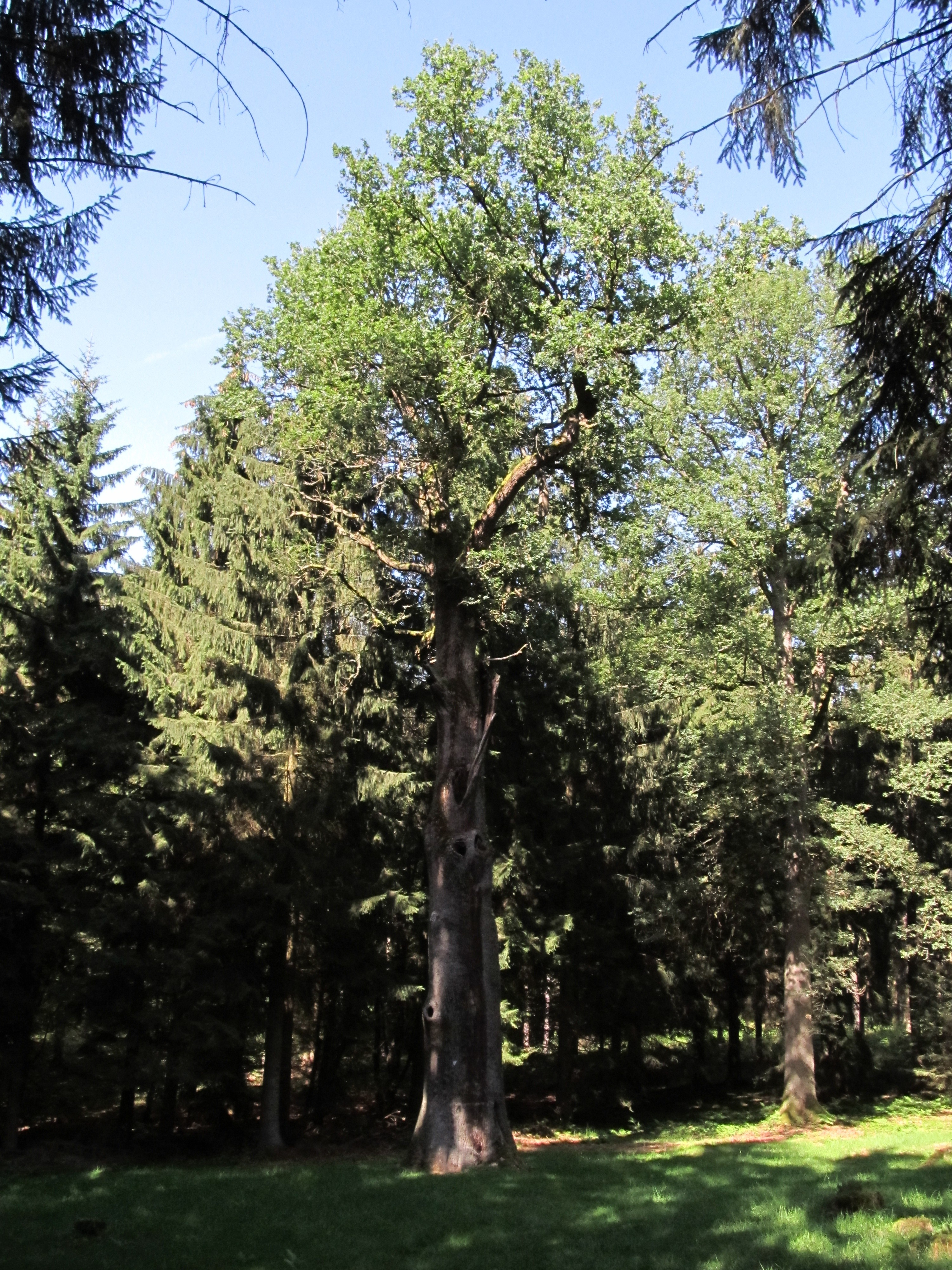 Die „Königseiche“ (oder „Schäfer-Eiche“) bei Salchendorf, Neunkirchen (Siegerland).